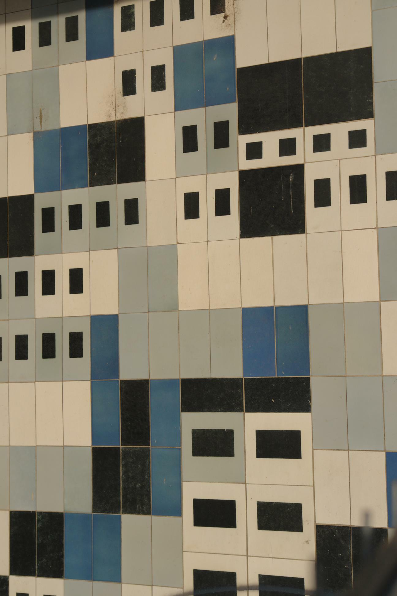 Fliesendetail an der Post in Dresden Neustadt